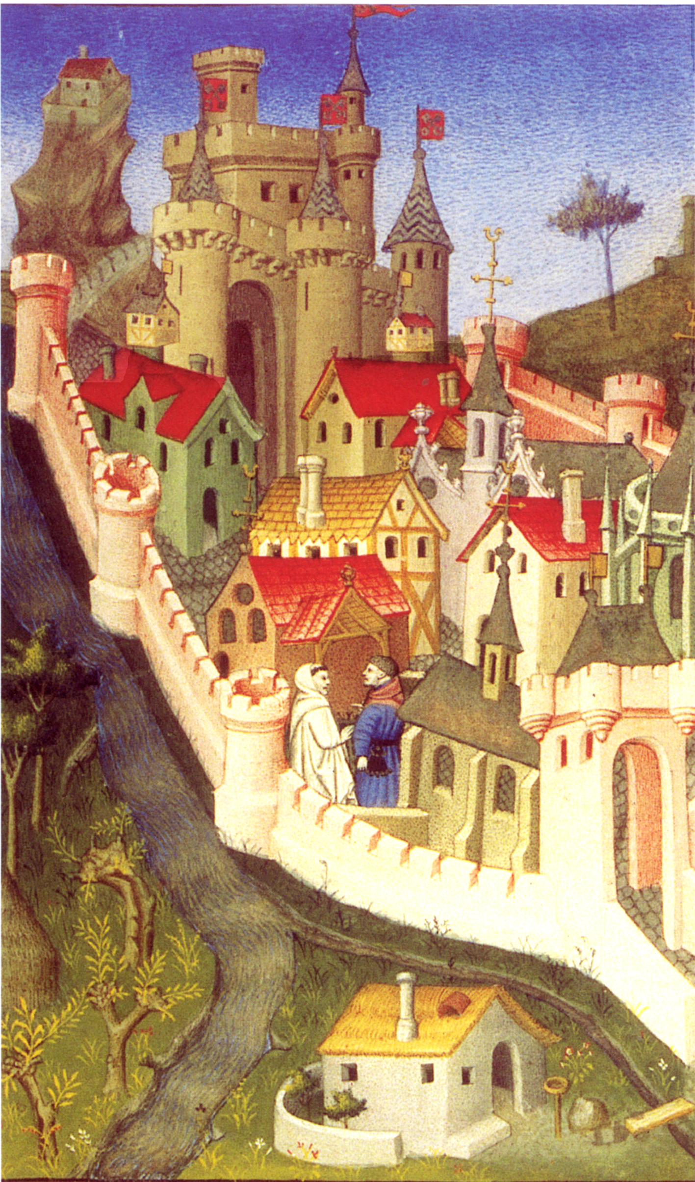 Miniature du début du XV° siècle. Atelier du Maître de Boucicaut, ms. 23279, f° 81 Bibliothèque Nationale.